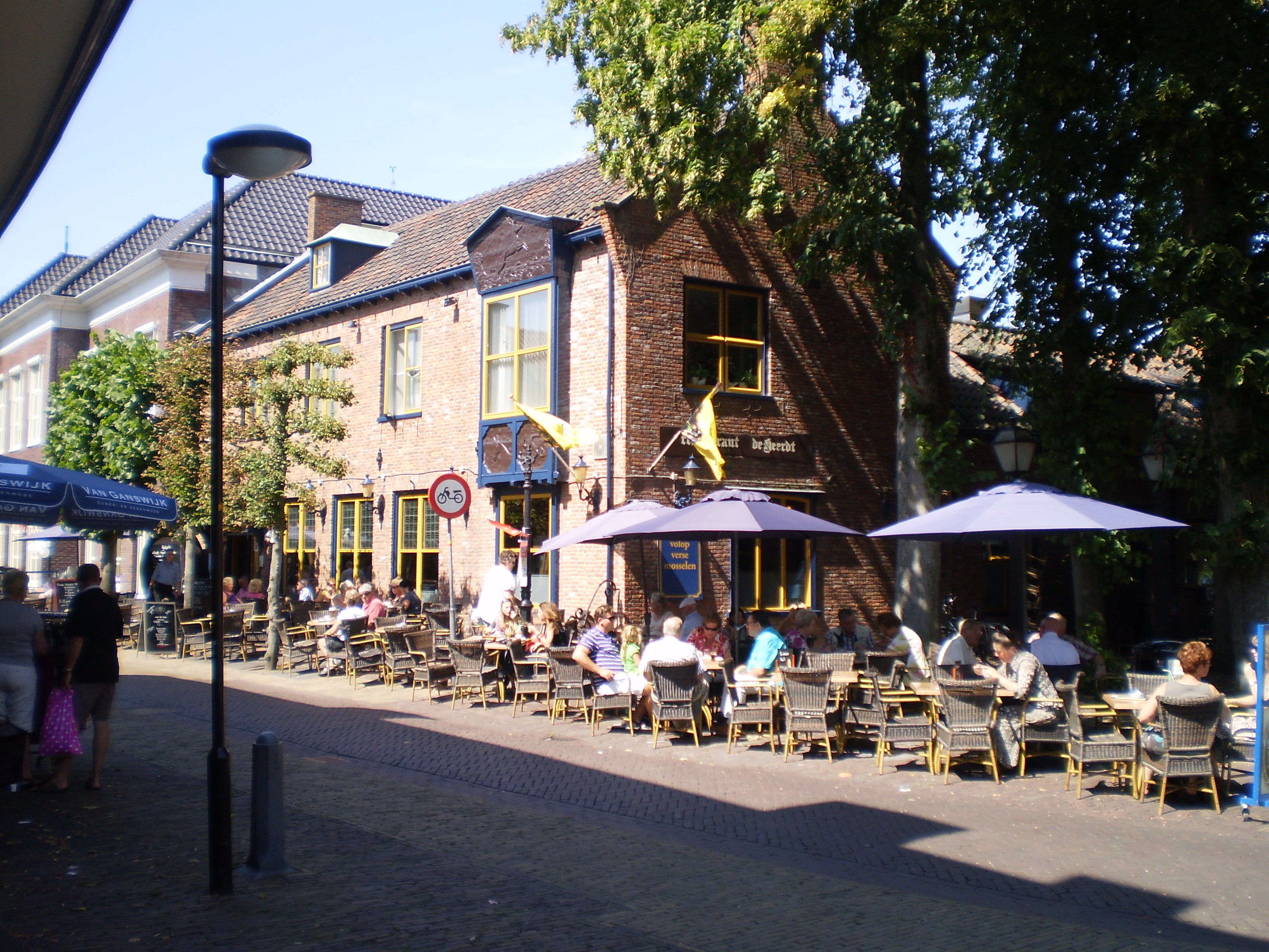 Begjin fan de Buorren, rjochts stiet de tsjerke, yn Putten.